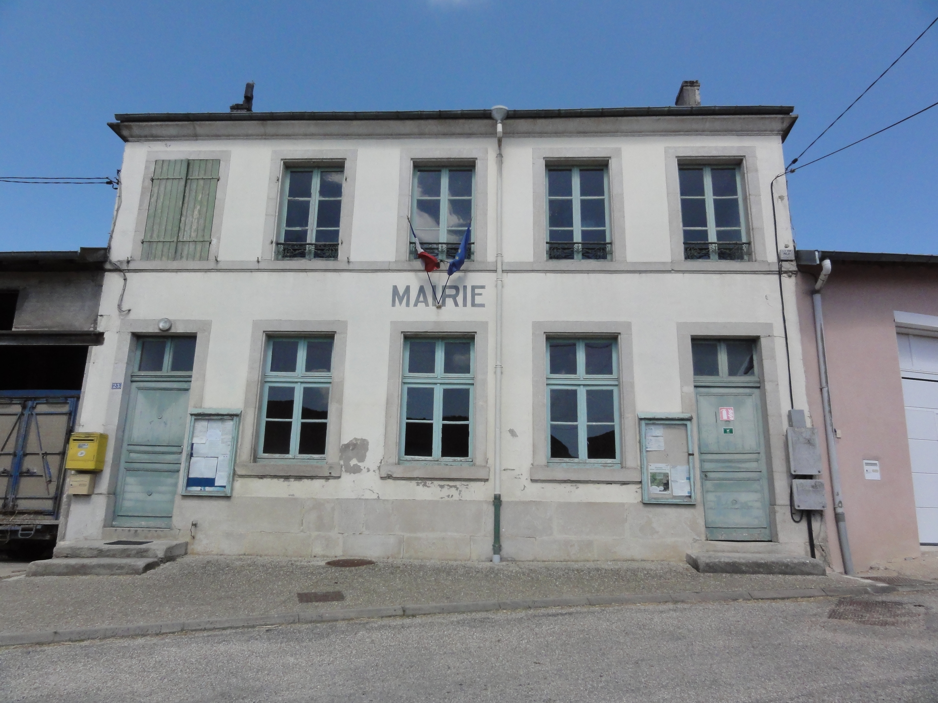 Ménil-aux-Bois (Meuse) mairie